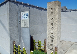 横浜開港の際、浄瀧寺にイギリス領事館が置かれていた。